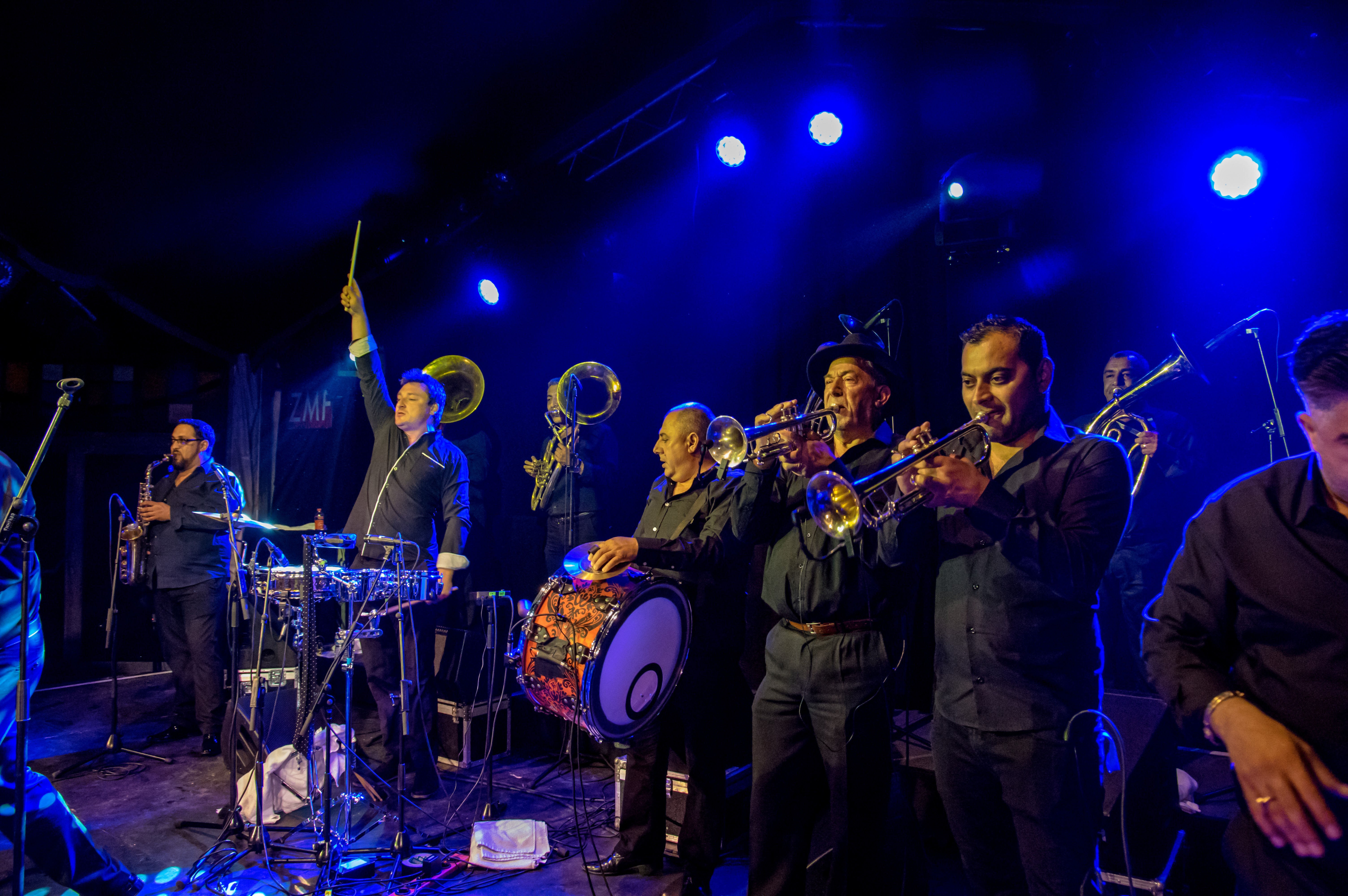 Bilder vom Zelt Musik Festival 2017 in Freiburg im Breisgau Fanfare Ciocarlia am 10.07.2017